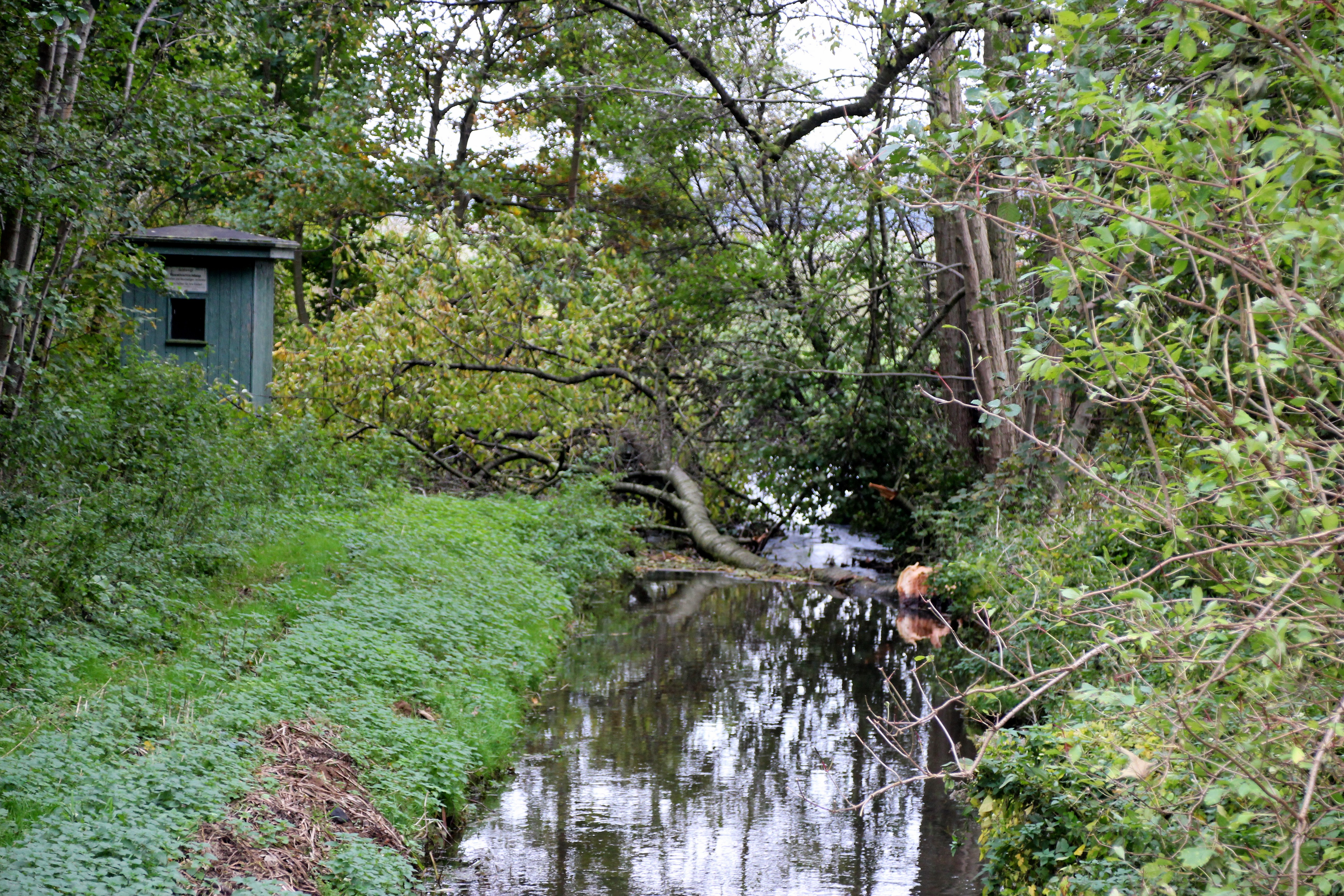 Fluss Dosse östlich der Brücke über die Landesgrenze zwischen BB (L147) und MV (L 206)